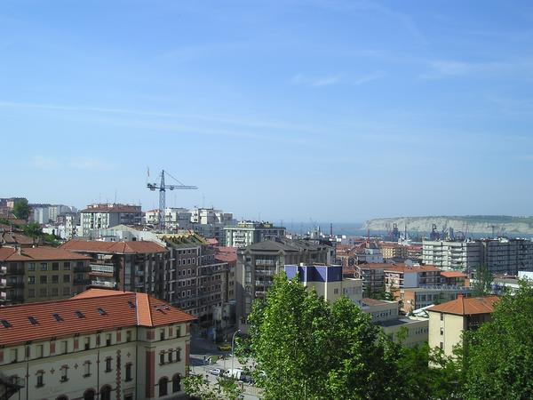 Santurtzi Santa Eulaliatik ikusia.